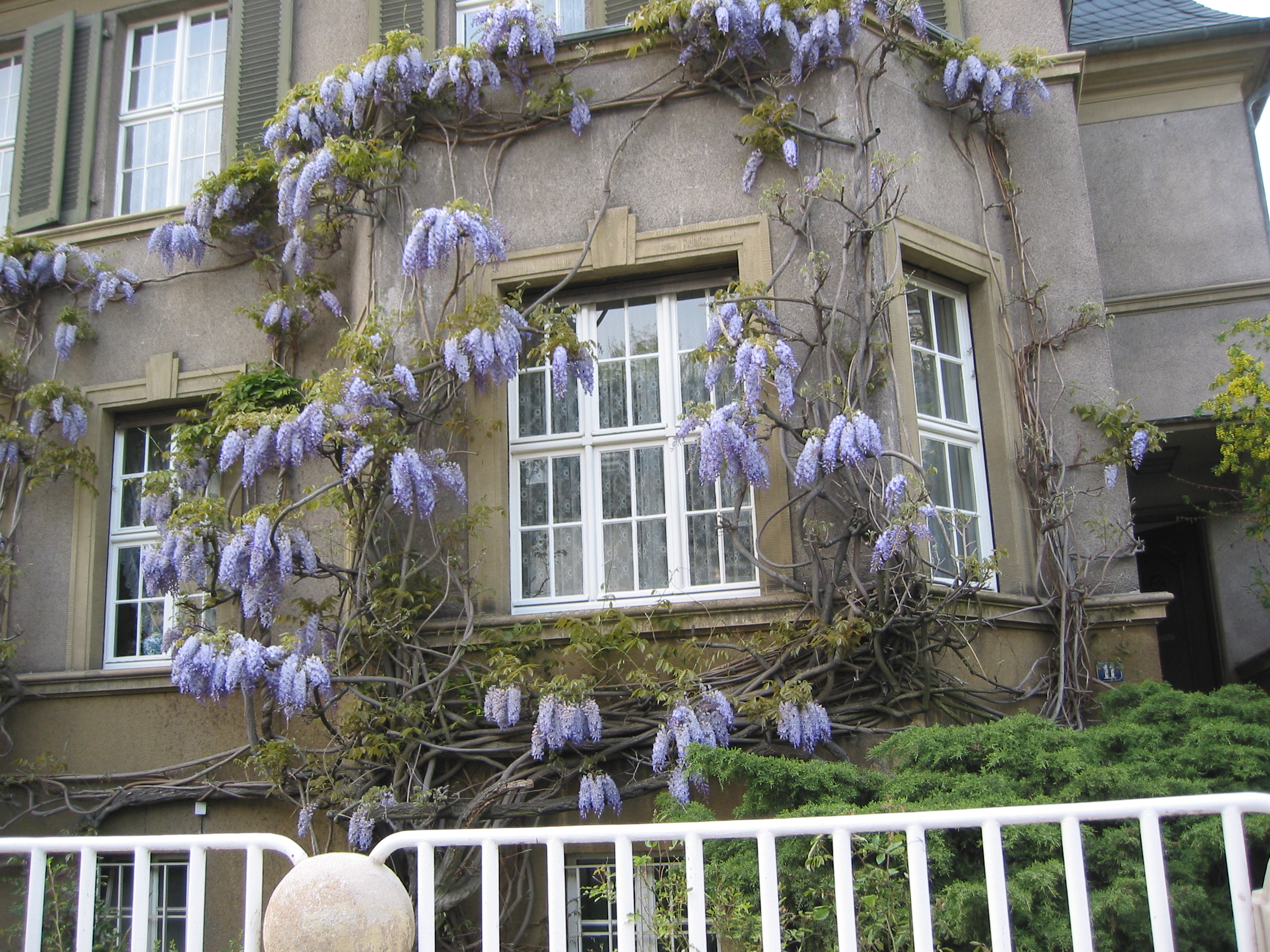 Wisteria.